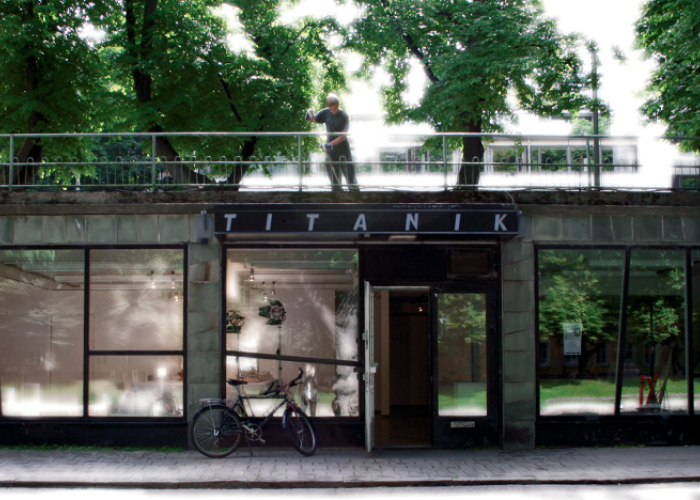 Titanik-galleria